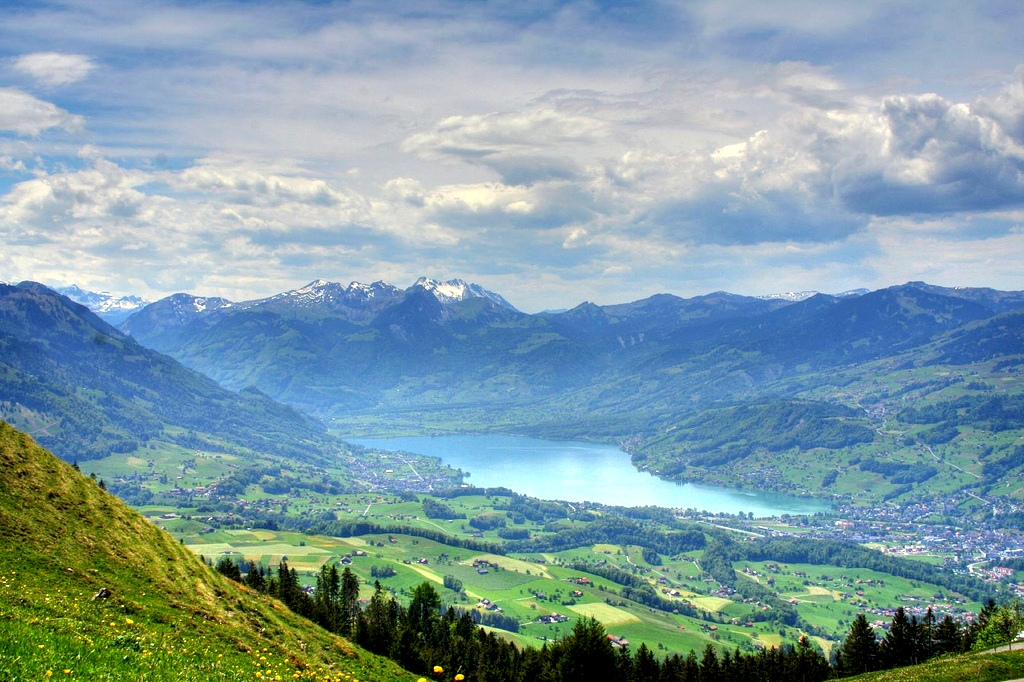 Lake Sarnen, Obwalden